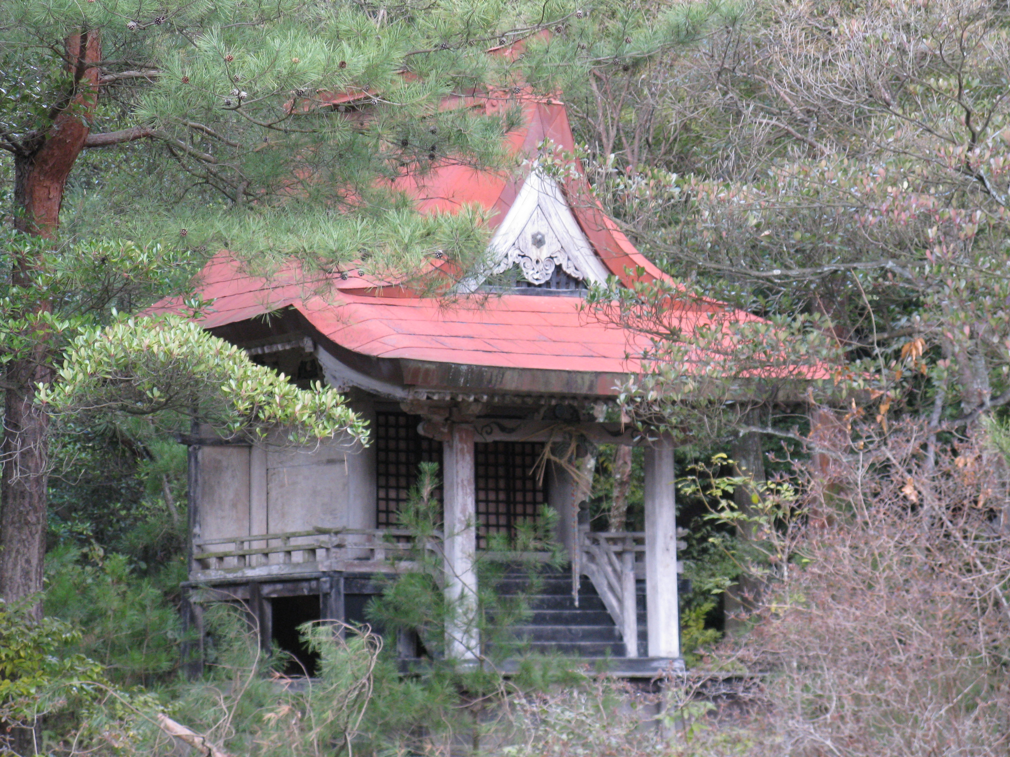 龍泉寺 弁天堂